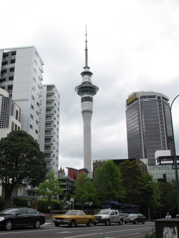 2008-11-04, Auckland Tower